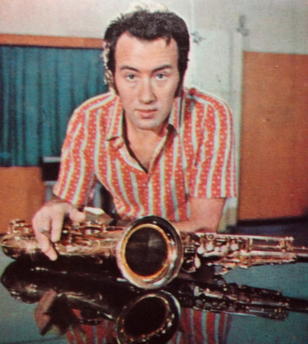 Italian jazz saxophonist Gianni Bedori aka Johnny Sax